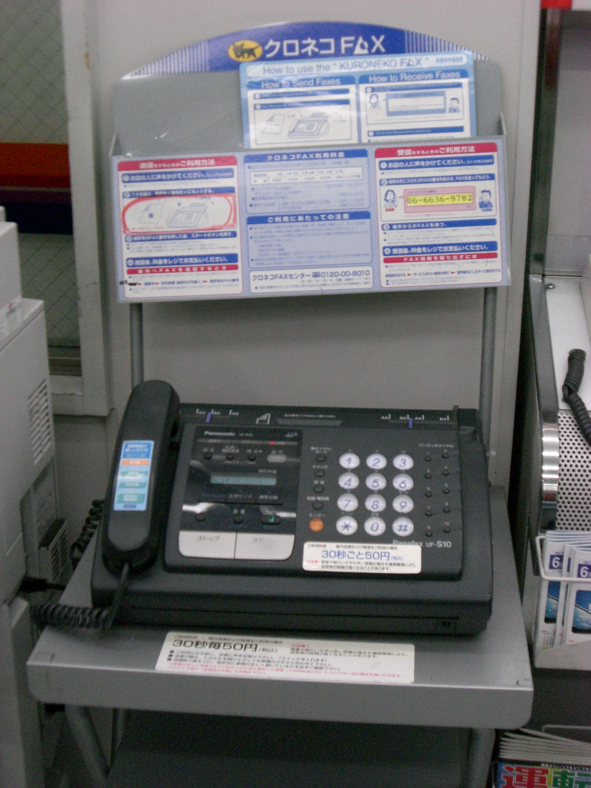 Kuroneko-FAX at am/pm Namba3